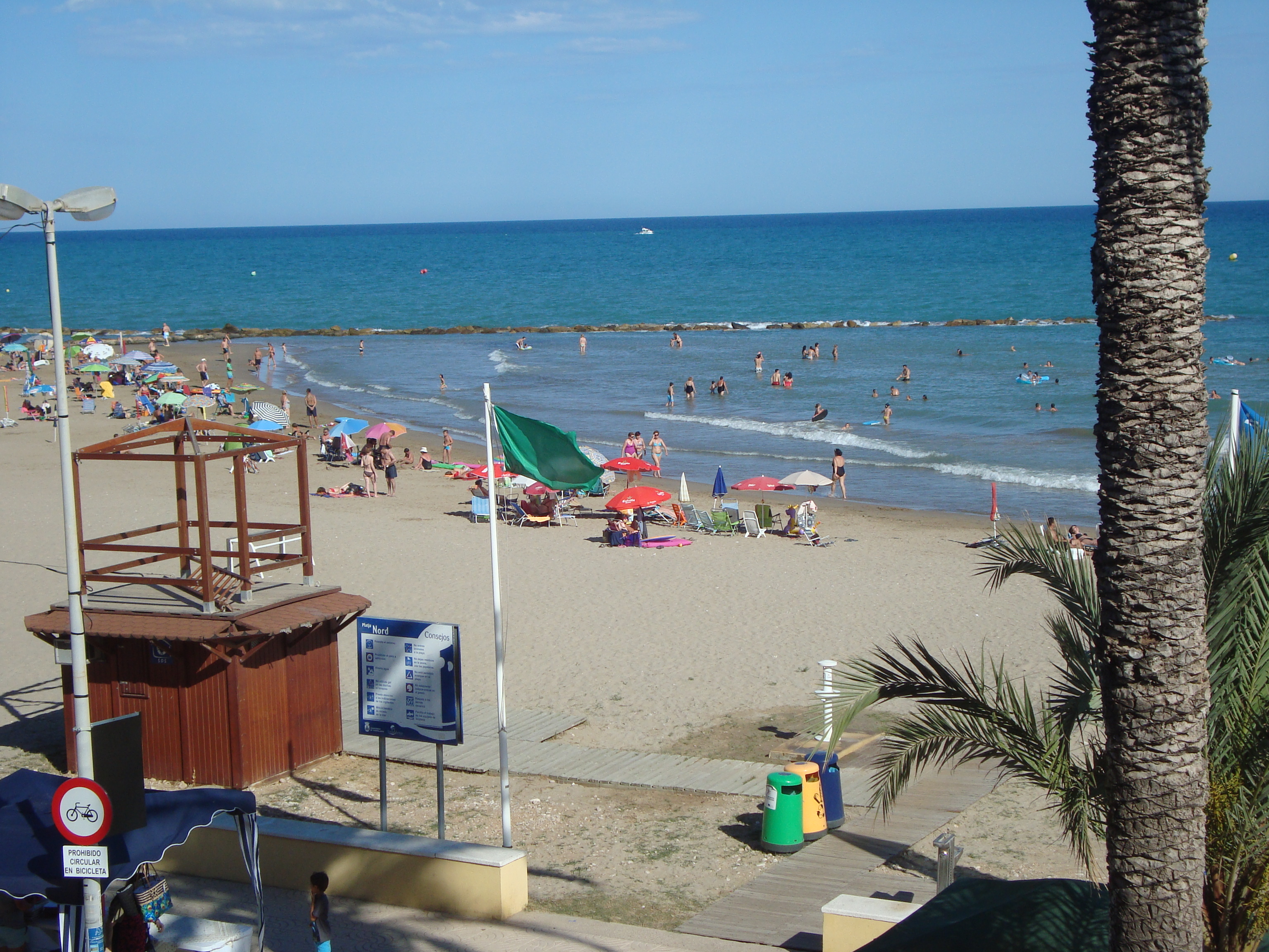 Playa Norte de Torreblanca, Castellón